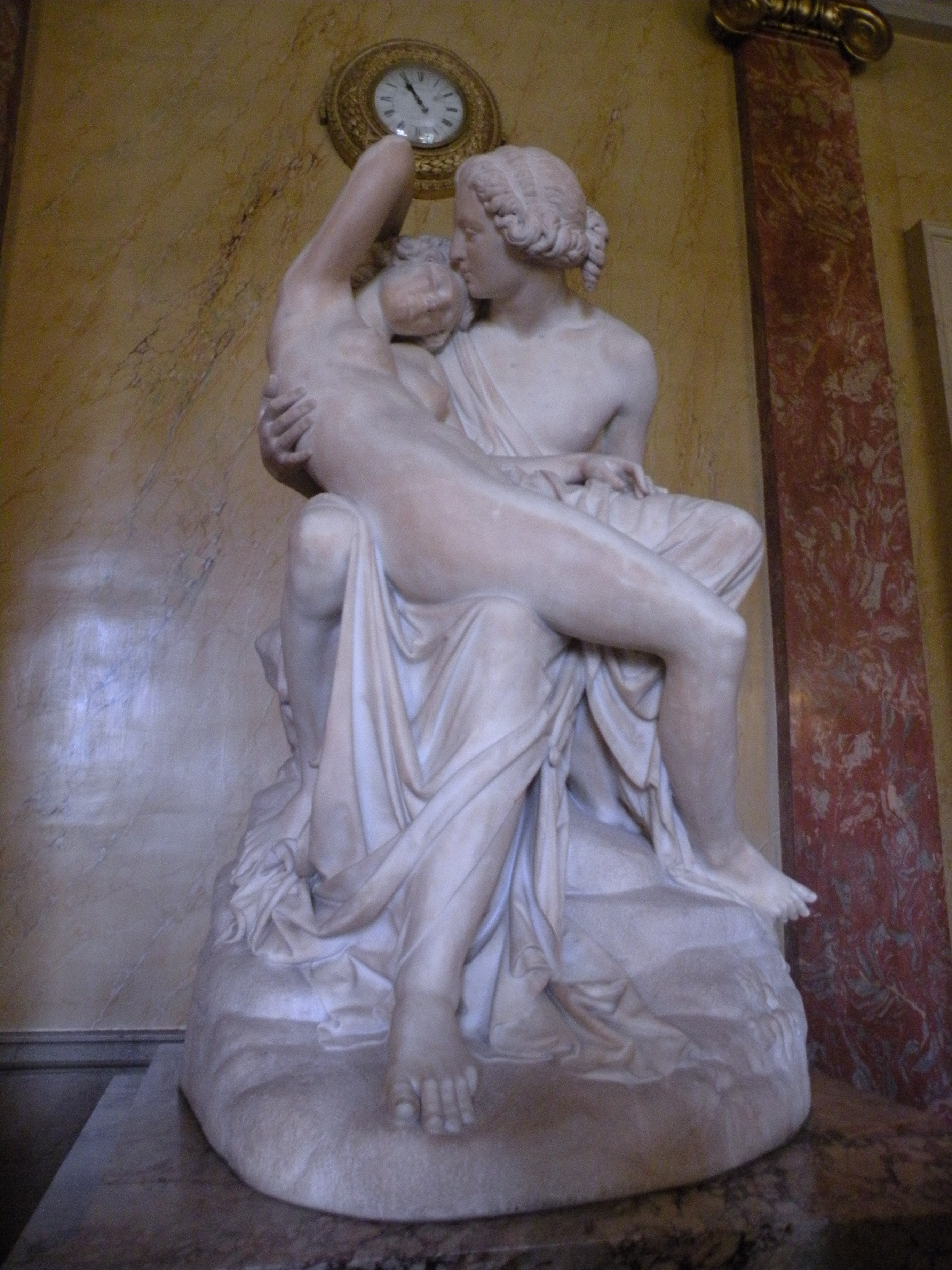 Joseph Pollet, Achille et Déidamie, 1854. Chambre de la Reine, Palais du Luxembourg.